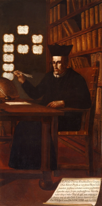 Retrato del matemático, arquitecto, filósofo y teólogo español Tomás Vicente Tosca (1651-1723).